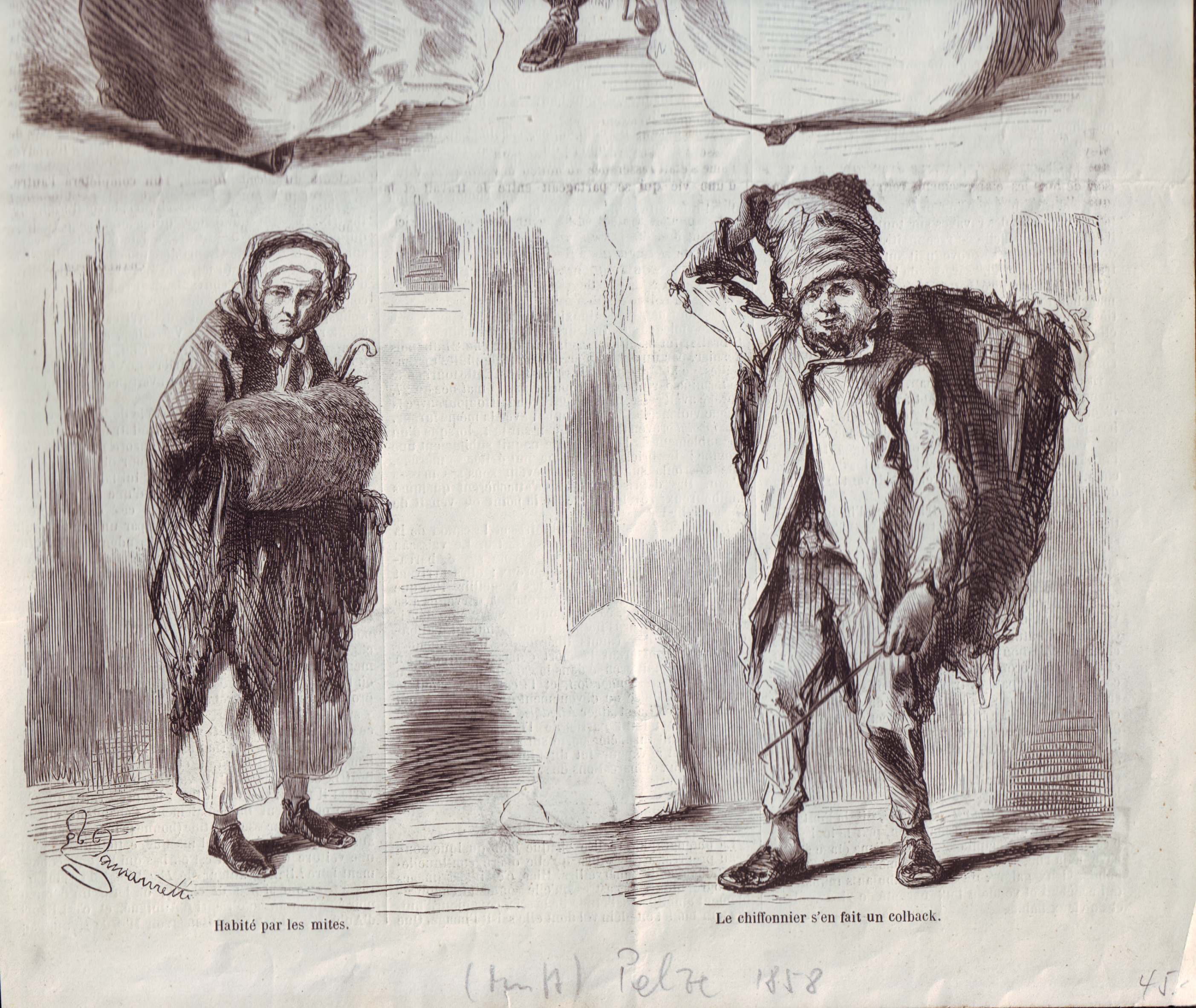 Histoire d'un Manchon Le Monde Illustré Habité par de jolies man. Habité par M. César. Habité par les mites. Le chiffonier s'en fait un colback.